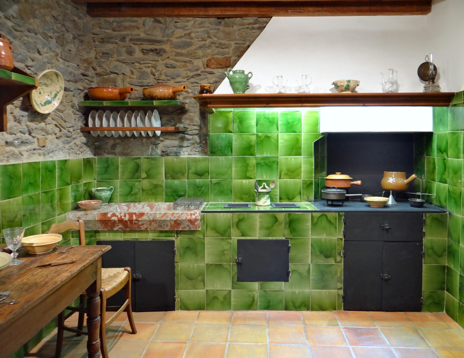 La cuisine de la Métairie de Maillol C'est pour la beauté de cette vallée de la Roume, proche de Banyuls-sur-mer, sa ville de naissance, qu'Aristide Maillol a acheté la Métairie. Il avait vécu dans son enfance dans cette vallée dont il affectionnait le paysage. Il allait dessiner et peindre dans la métairie lors de ses séjours à Banyuls puis plus âgé il s'y retira. Il y reçut de nombreuses personnalités artistiques pour lesquelles il cuisinait lui-même. Sa tombe se trouve dans la clairière de la Métairie dont son fils Lucien Maillol (1896-1972) a fait don à Banyuls à la mort de son père. Grâce aux actions conjuguées de son denier modèle Dina Vierny, d'élus de la ville de Banyuls et de mécènes, la Métairie a été restaurée et un petit musée Maillol y a été ouvert au public fin 1994. Il dépend de la fondation Dina Vierny qui a créé le musée Maillol à Paris. Le site officiel du musée Maillol de Banyuls-sur-mer Article de Wikipedia sur Aristide Maillol